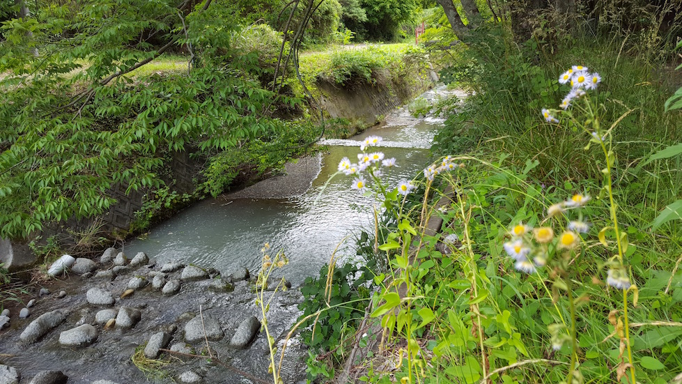 吉田川上流（駿河区平沢）